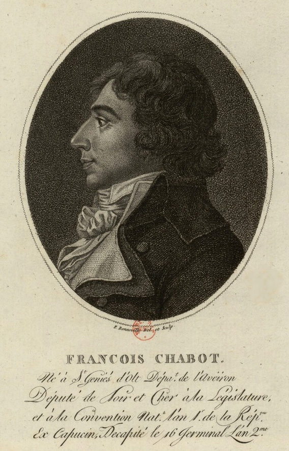 François Chabot : né à Saint-Geniez-d'Olt département de l'Aveyron, député de Loir et Cher à la Législature, et à la Convention nationale l'an 1er de la République, ex-capucin, décapité le 16 germinal l'an 2 (estampe).